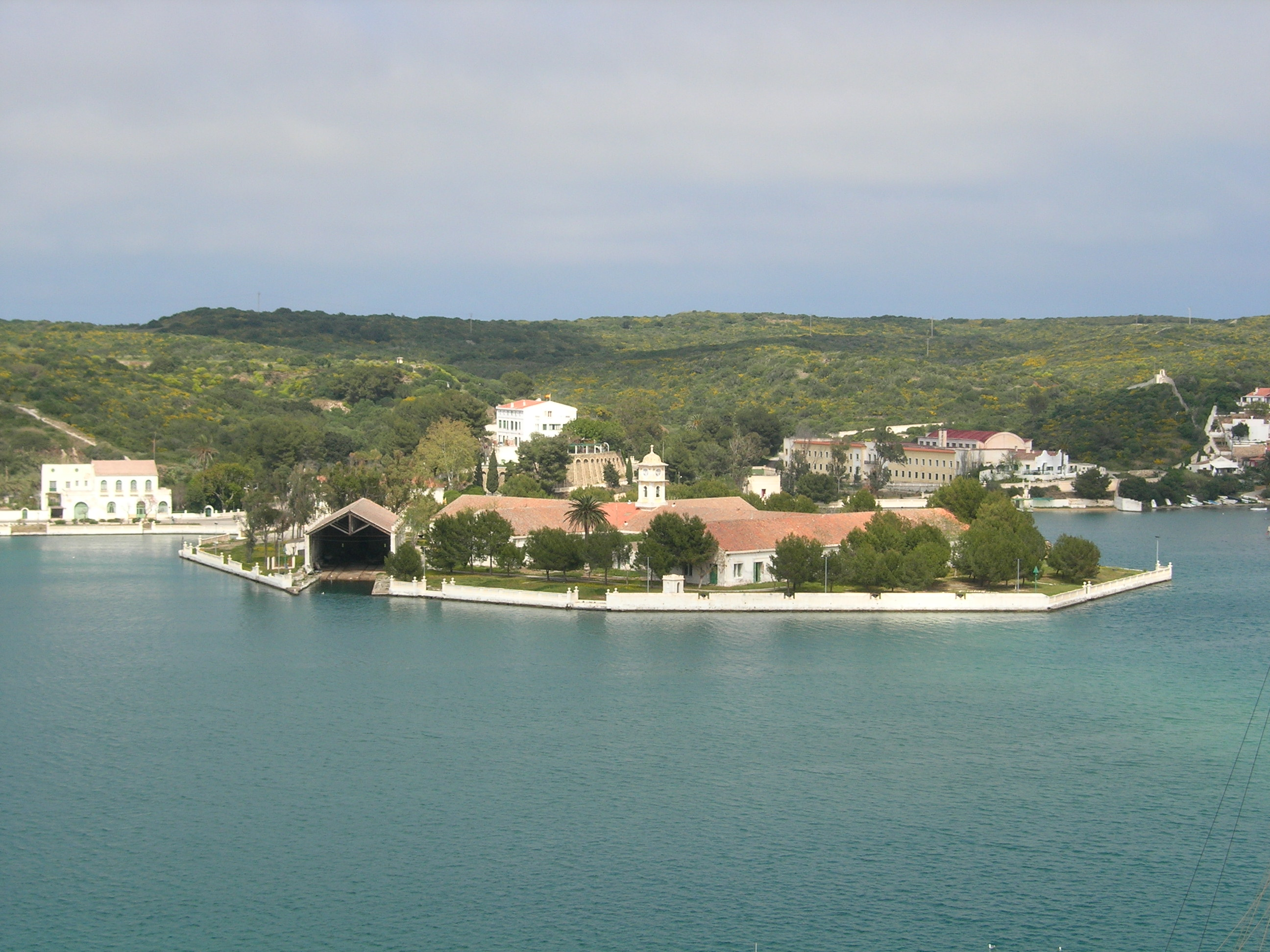 S'Arsenal, illa des Gegants o d'en Pintot, nucli inicial de la base naval de Maó (Menorca)